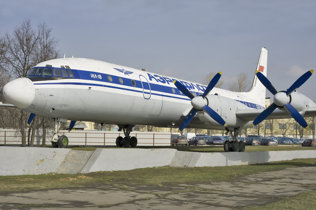 Il-18 CCCP-75554.Sheremetyevo.Moscow.(Он гордо стоит на своем постаменте,с Советским именем-Аэрофлот).